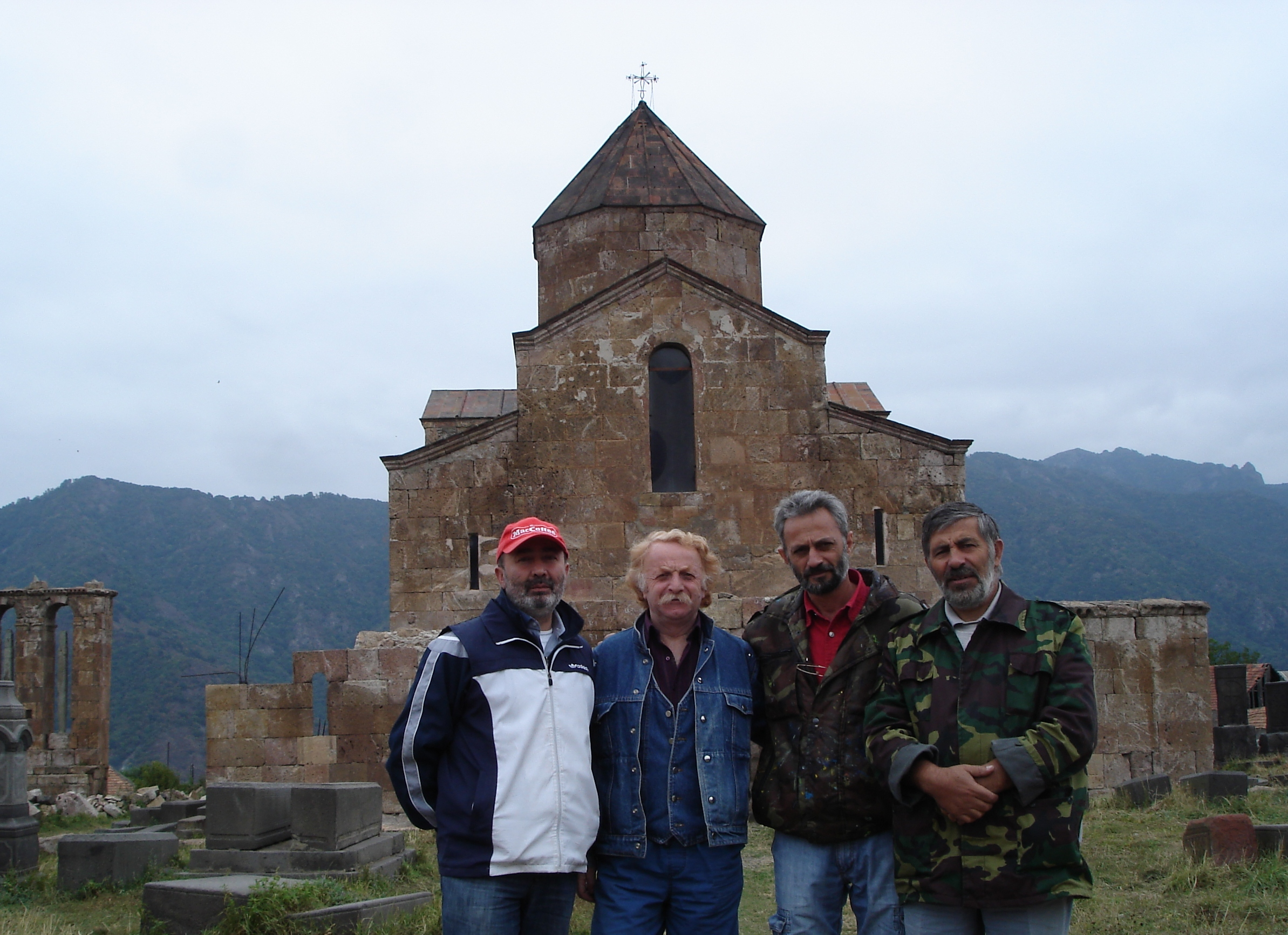 ԱԼՓԱ ԵՎ ԸՆԿԵՐՆԵՐ